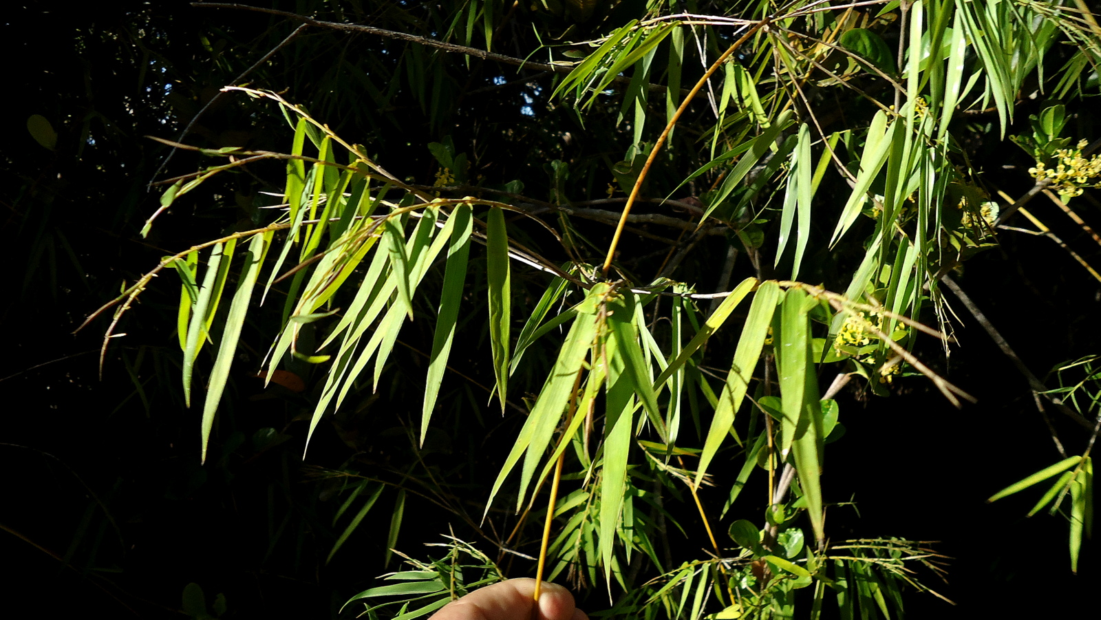 Atractantha falcata McClure